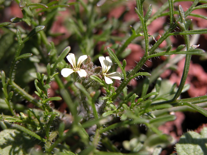 Carrichtera annua (Cucharilla, Mastuerzo valenciano) - Lanzarote, Islas Canarias (España).